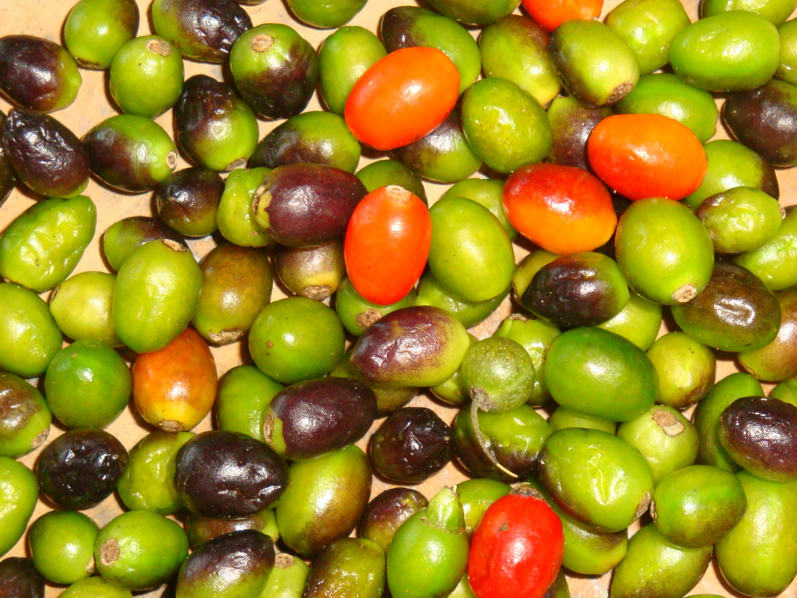 Chile amashito, originario del estado de Tabasco, México.